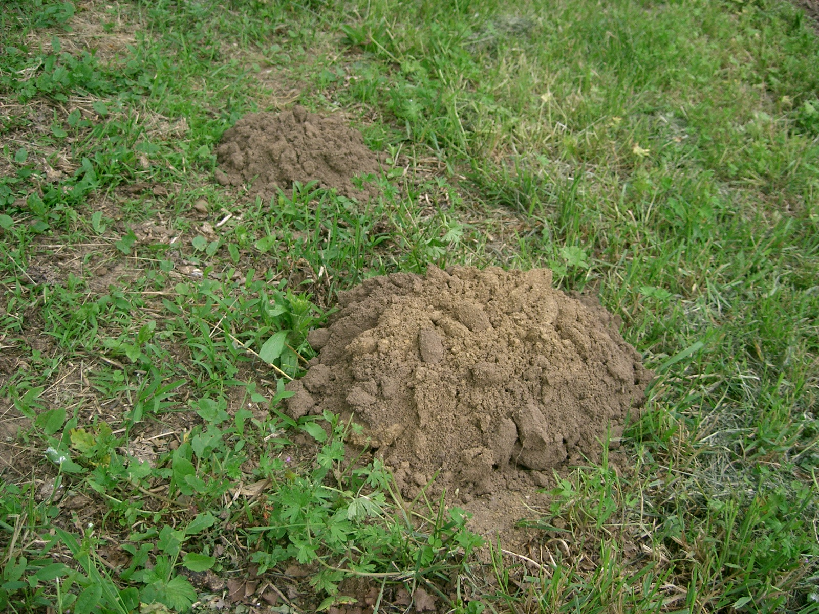 Taupinière - mole-hill self made PRA